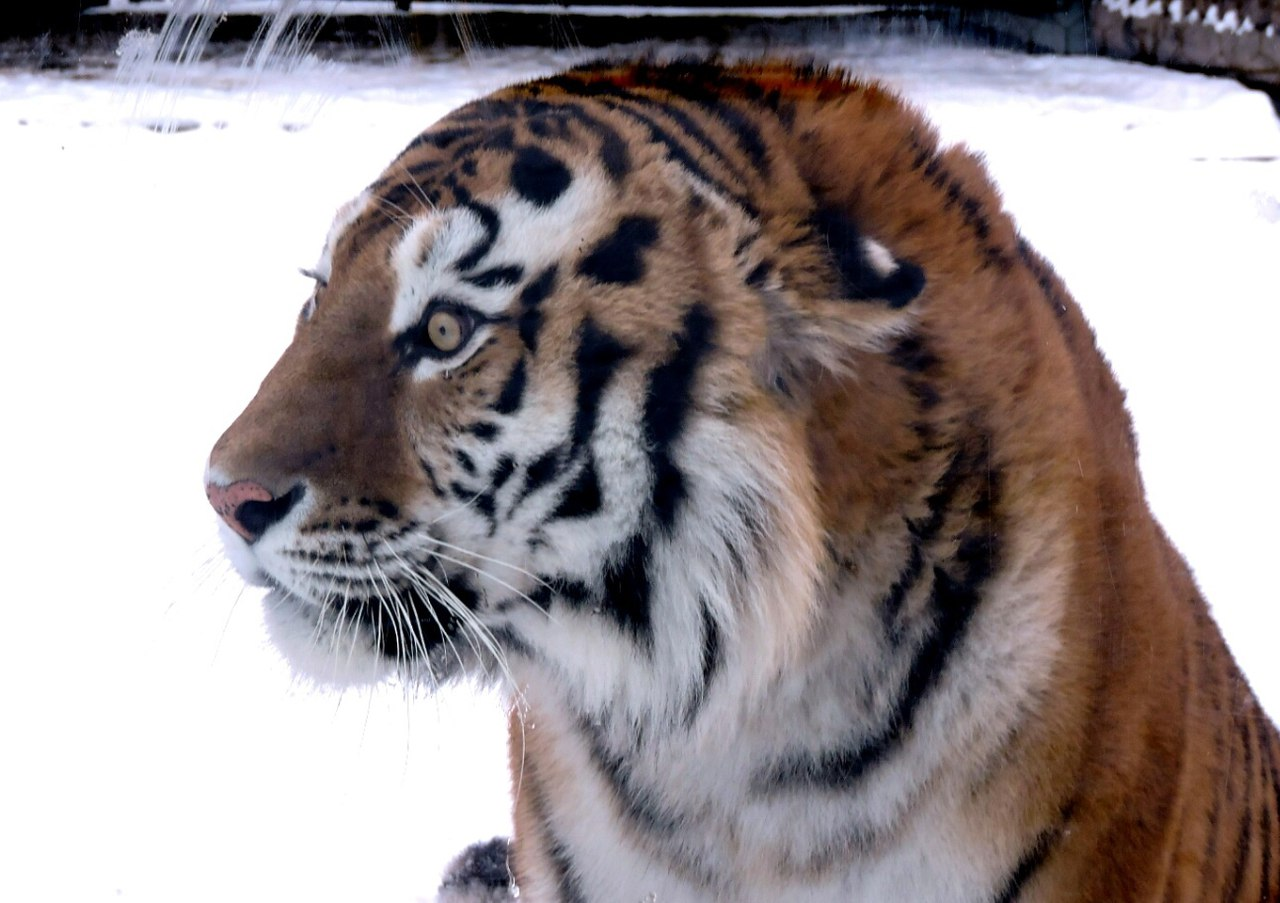 Тигр Устин в Ростовском зоопарке.